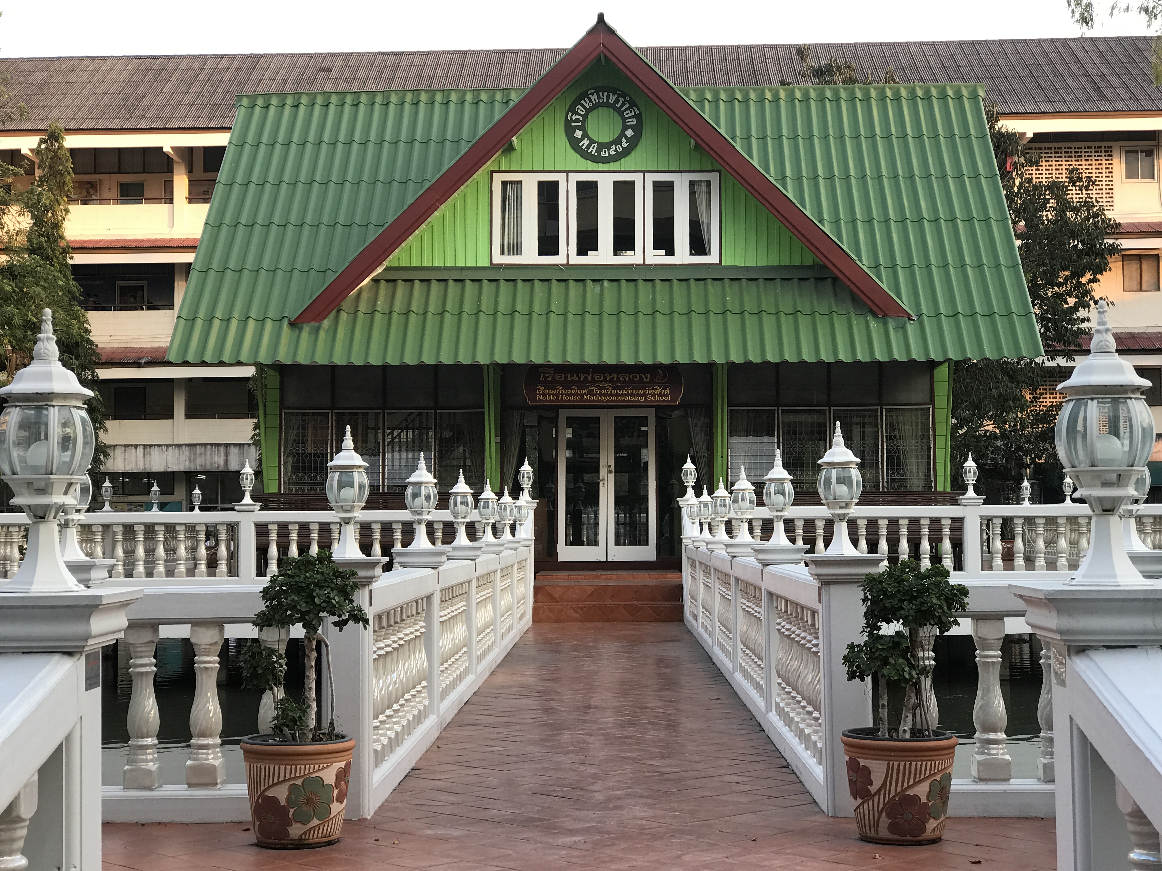 เรือนพิมพ์รำลึกหลังย้ายตำแหน่ง